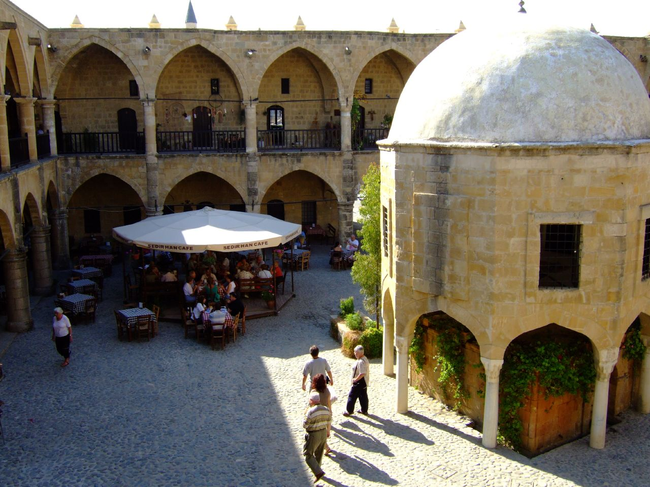 Nicosia, Ciprocaravanserai 5